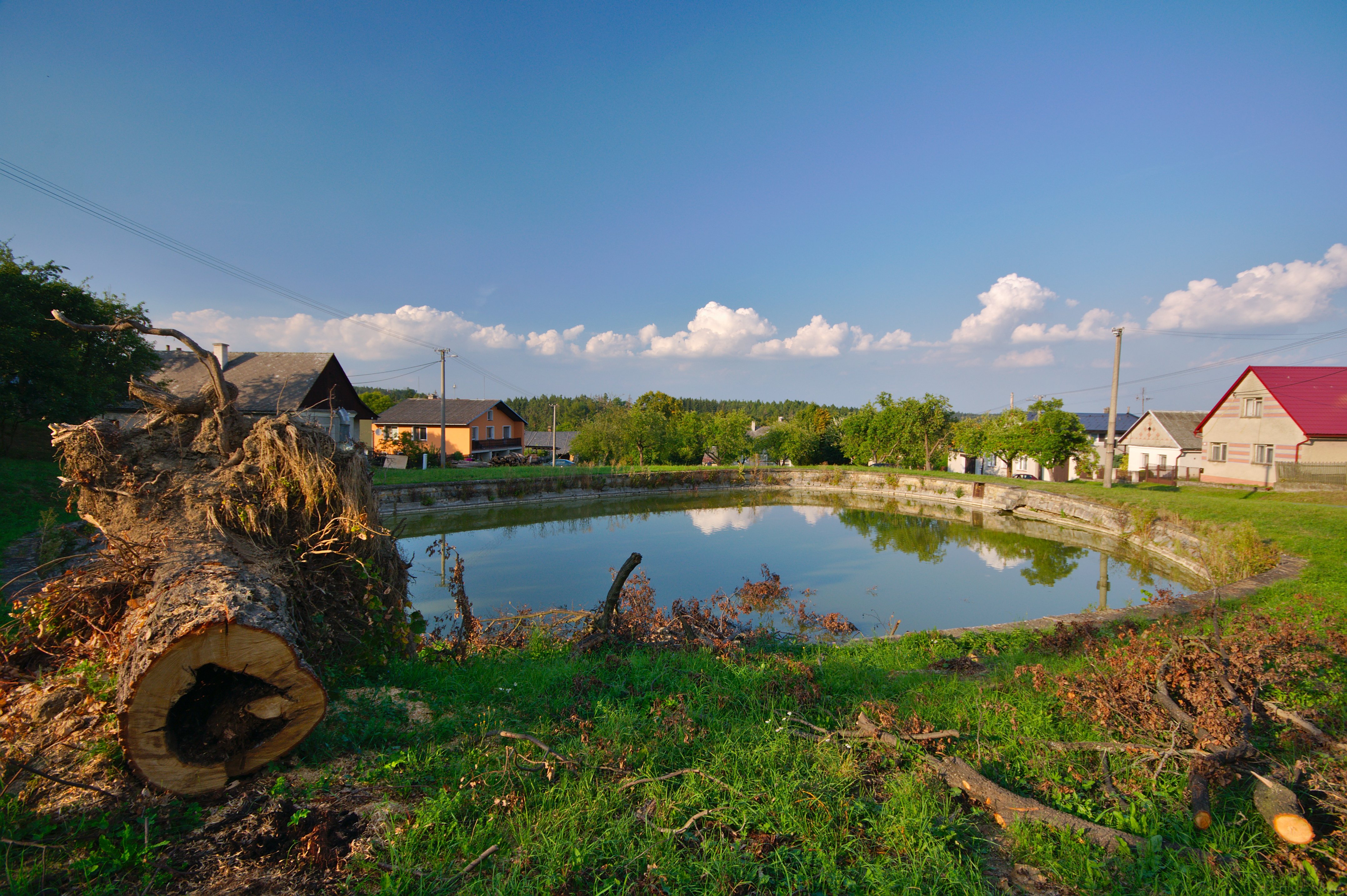 Rybník na návsi, Radnice, Pavlov, okres Šumperk